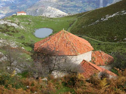 Capillas legendarias del Monte Monsacro